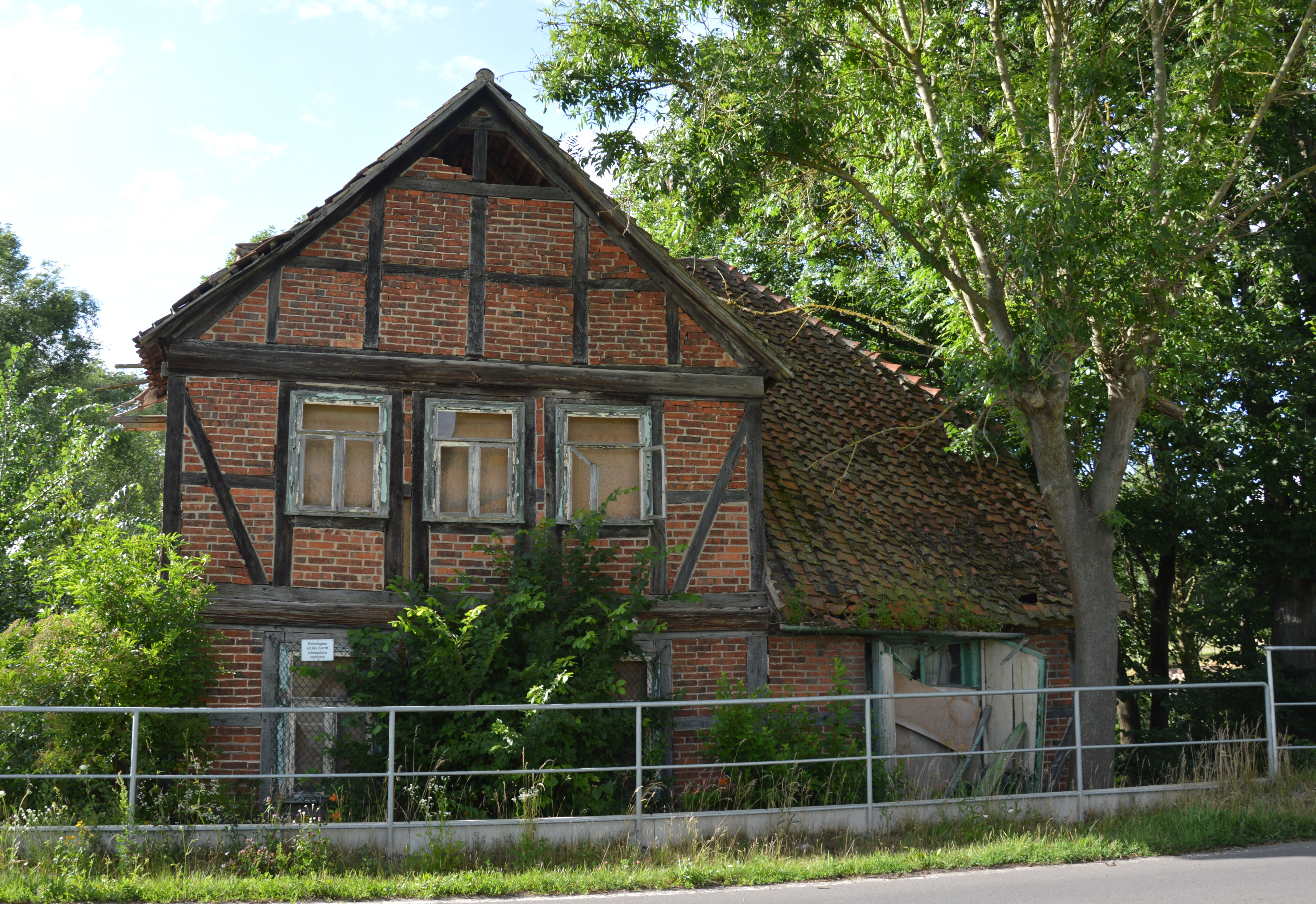 Dorfstraße (Groß Bartensleben) Mühle